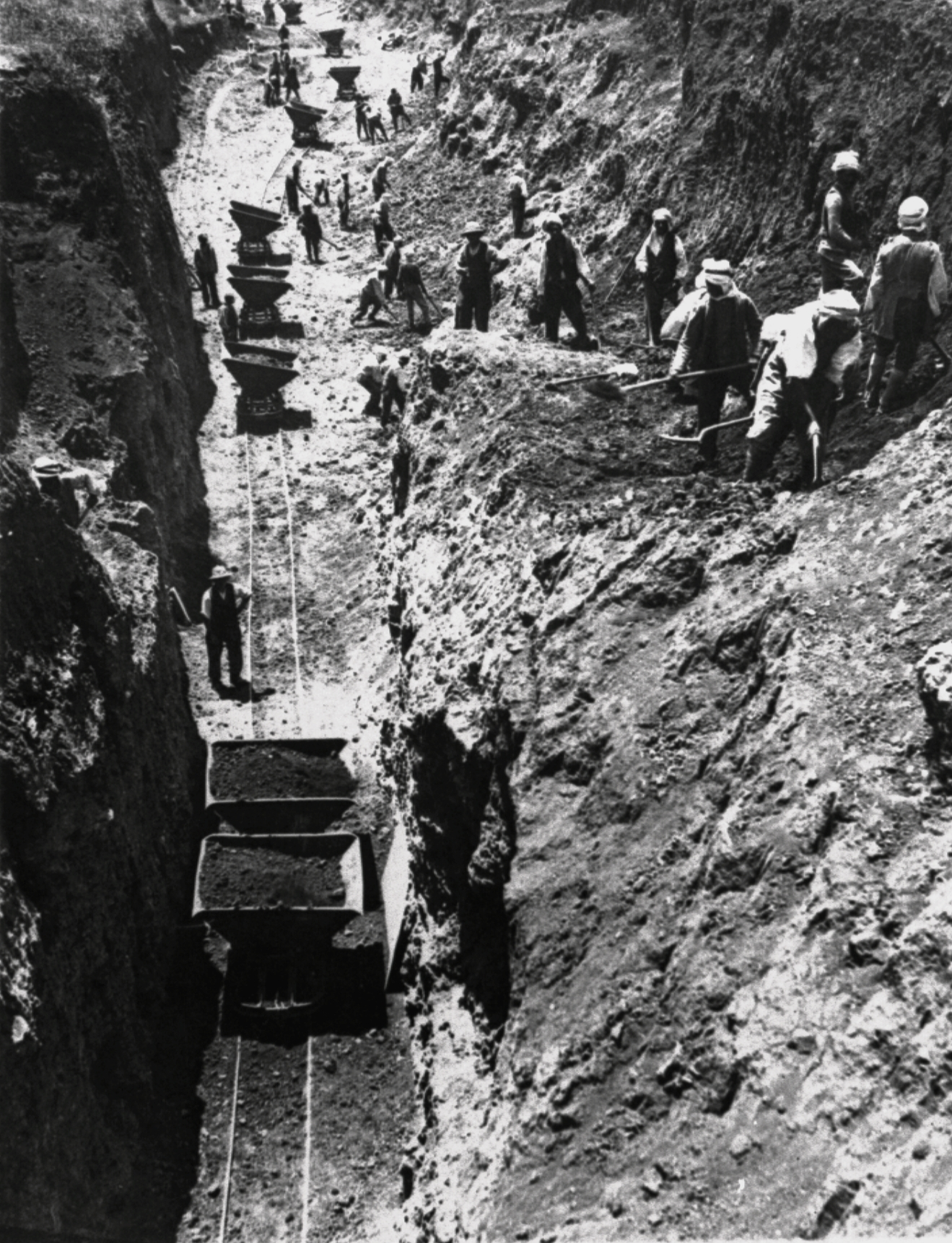 Lavori di costruzione della ferrovia Algeri - Tunisi. Molto lavoro fu dato in appalto a impresari biellesi Souk-Ahras, Algeria